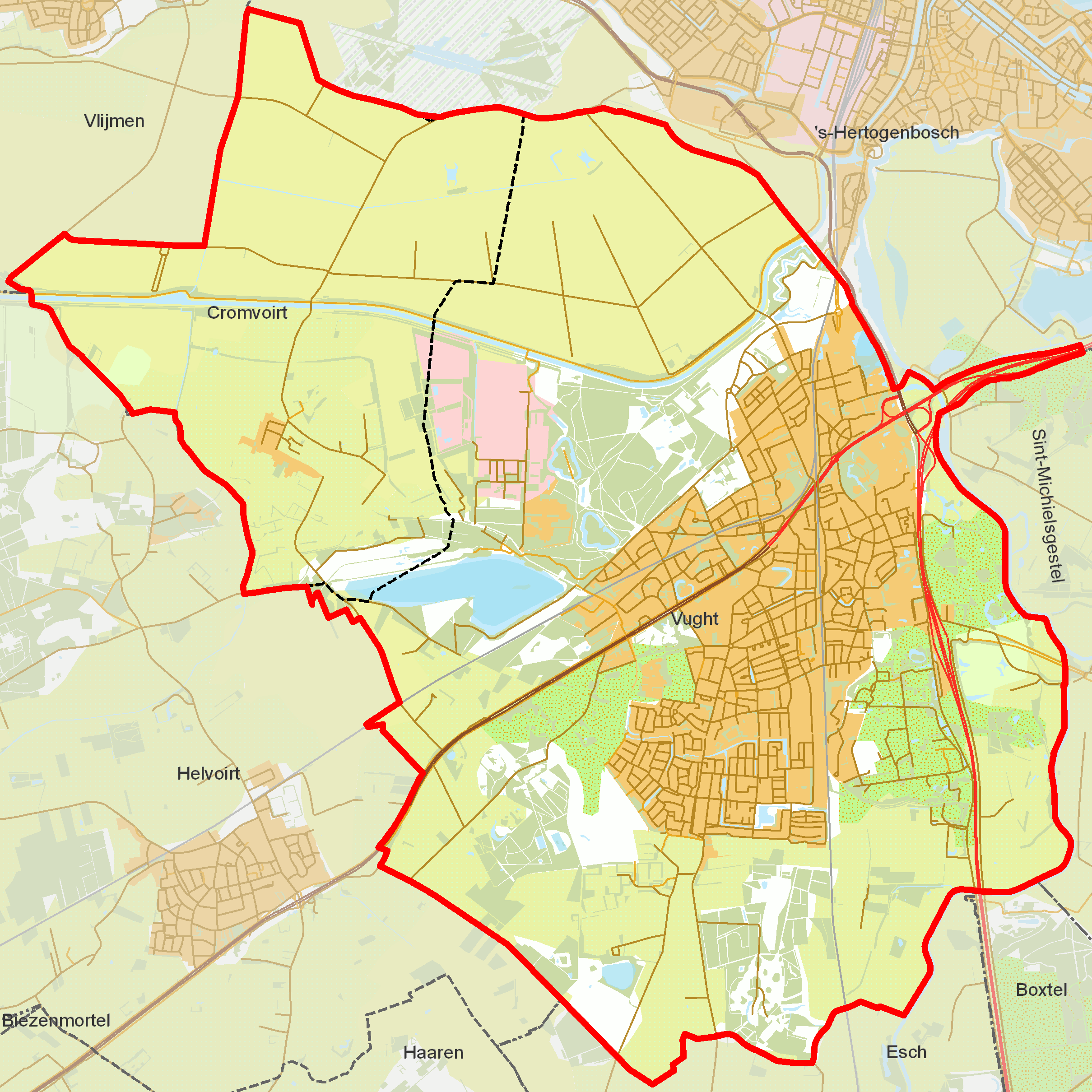 BAG woonplaatsen - Gemeente Vught.png